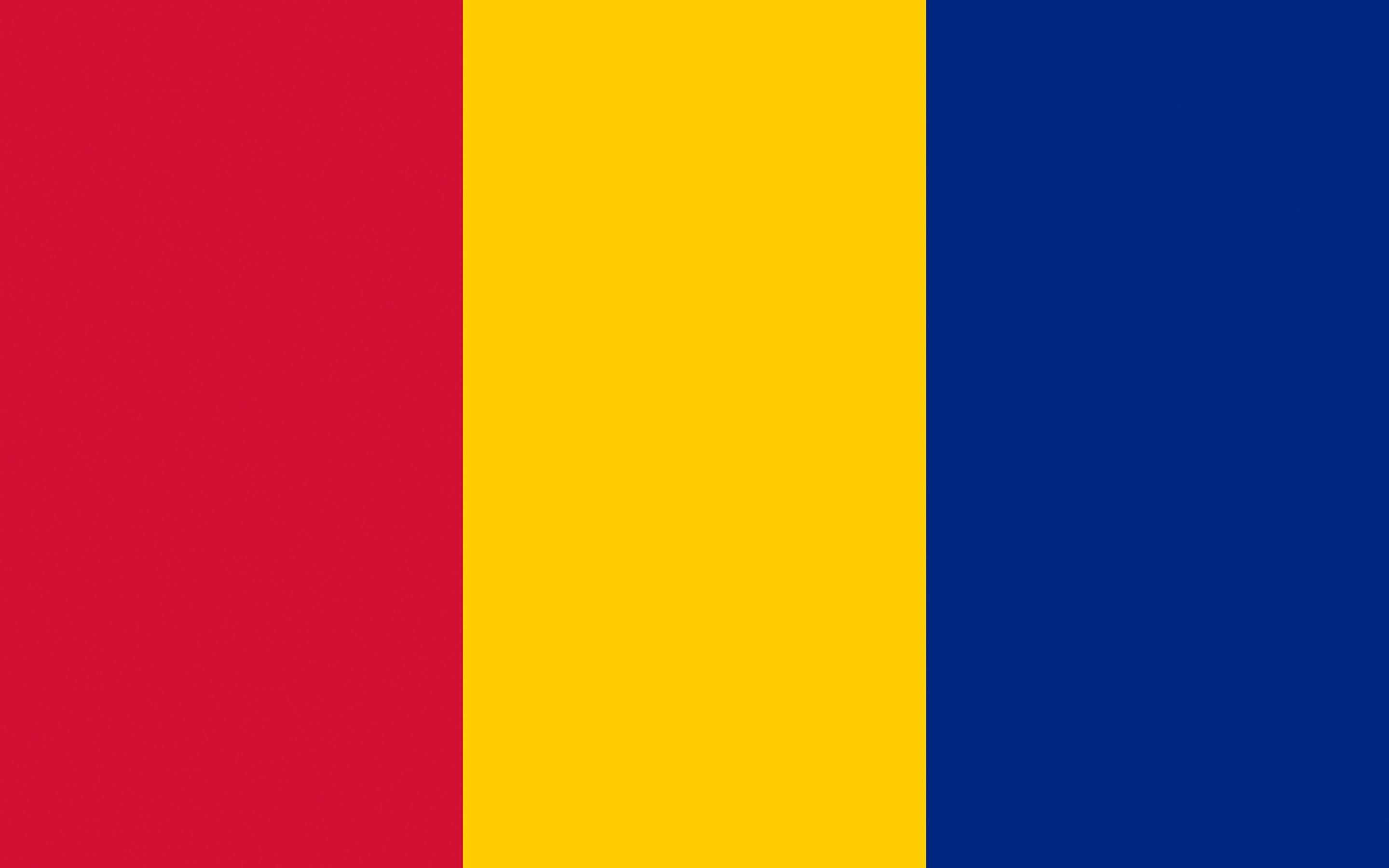 Pabellón de tres franjas verticales, gules, oro y azur.